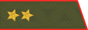 Погоны генерал-лейтинанта сухопутных войск РФ